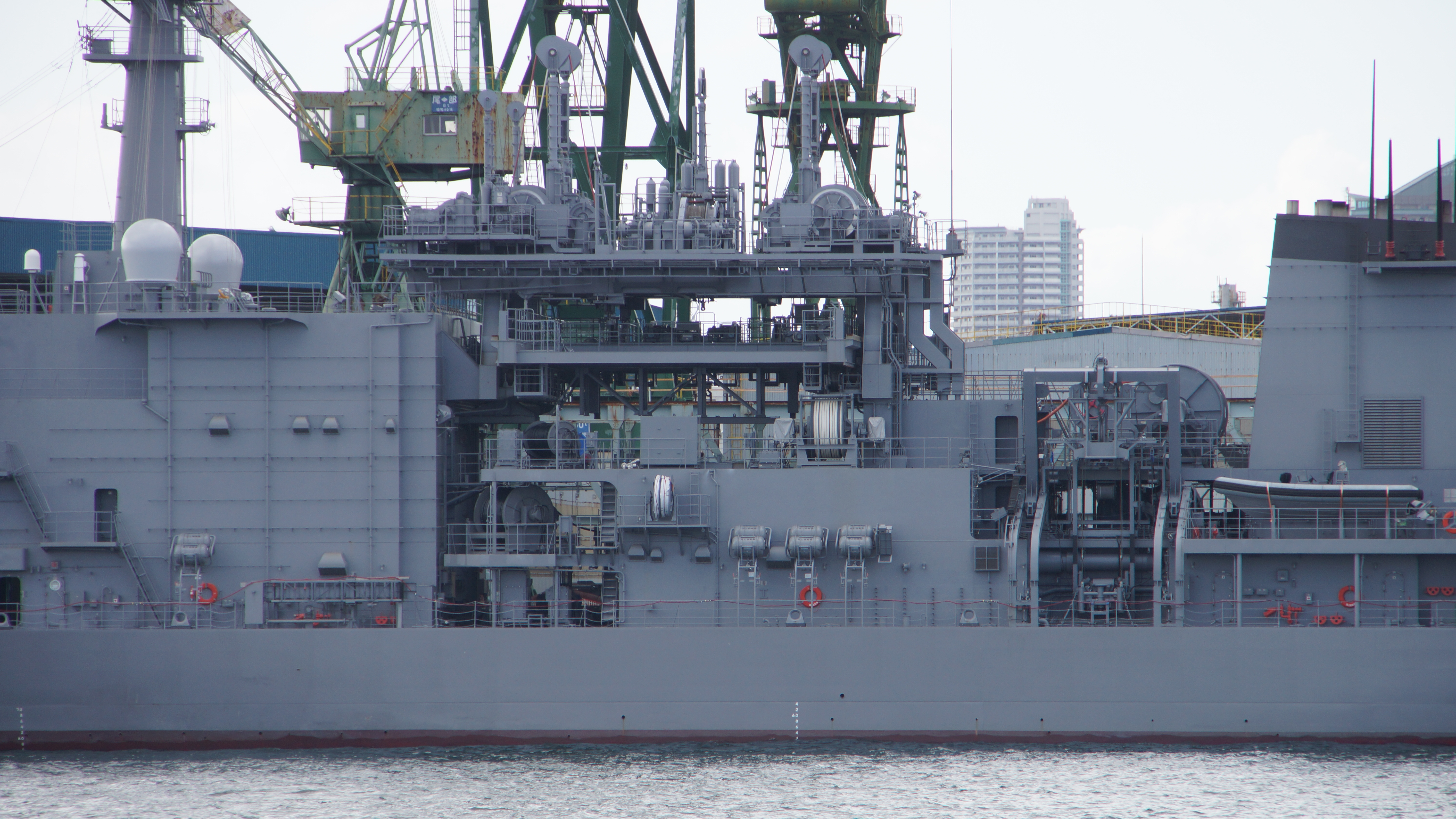 海上自衛隊 潜水艦救難艦ちよだ（ASR-404） 船体中央部 左舷側面。2017年11月11日 川崎重工神戸工場にて。